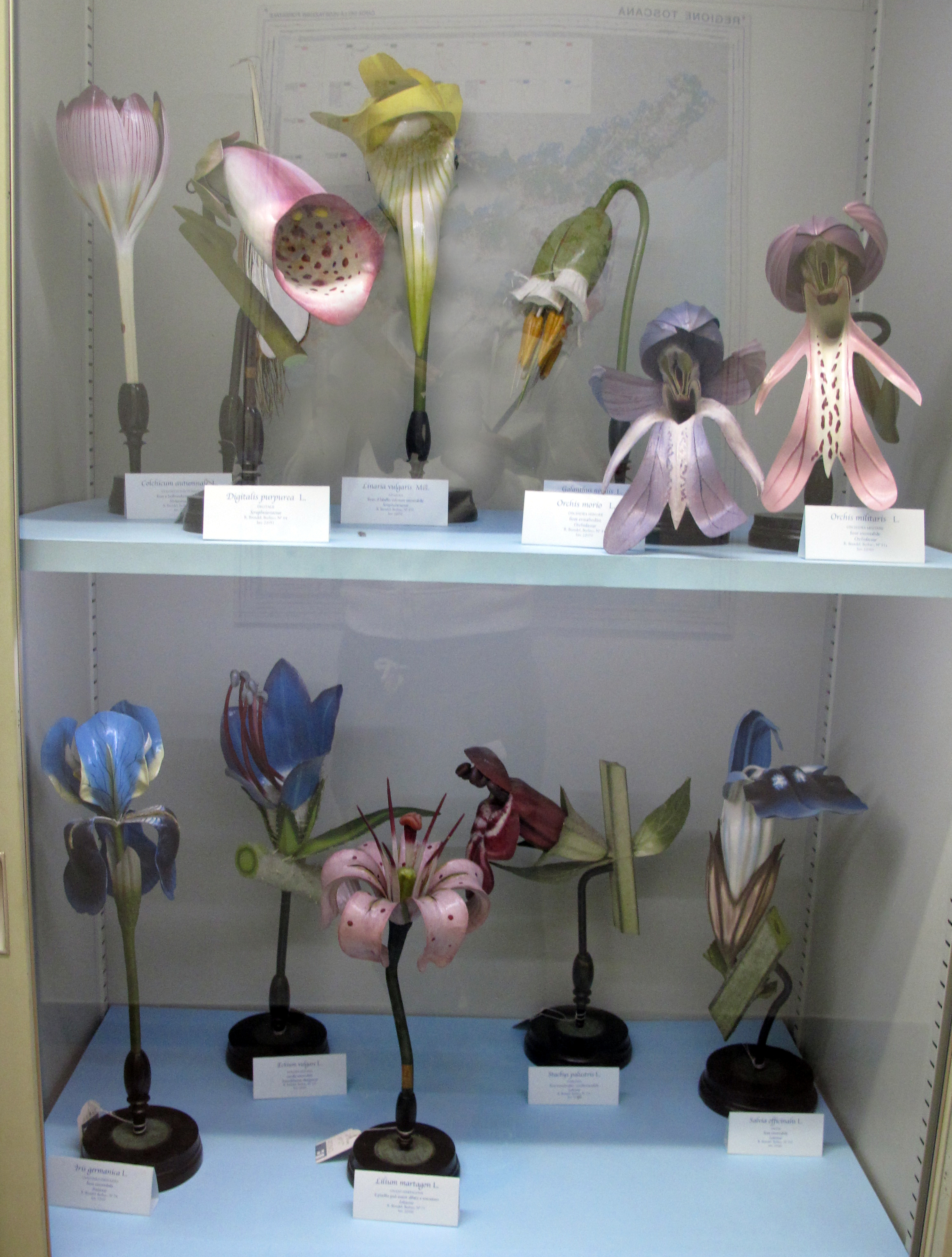 Museo di Storia Naturale, Firenze